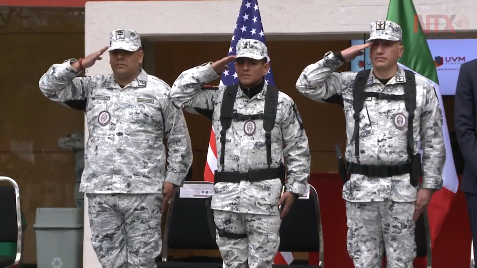 Presentation of National Guard 1:22